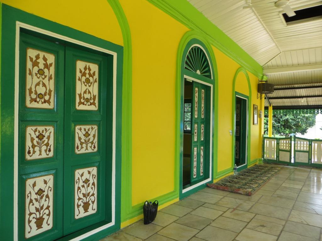 Masjid Jami Sultan Lingga pintu